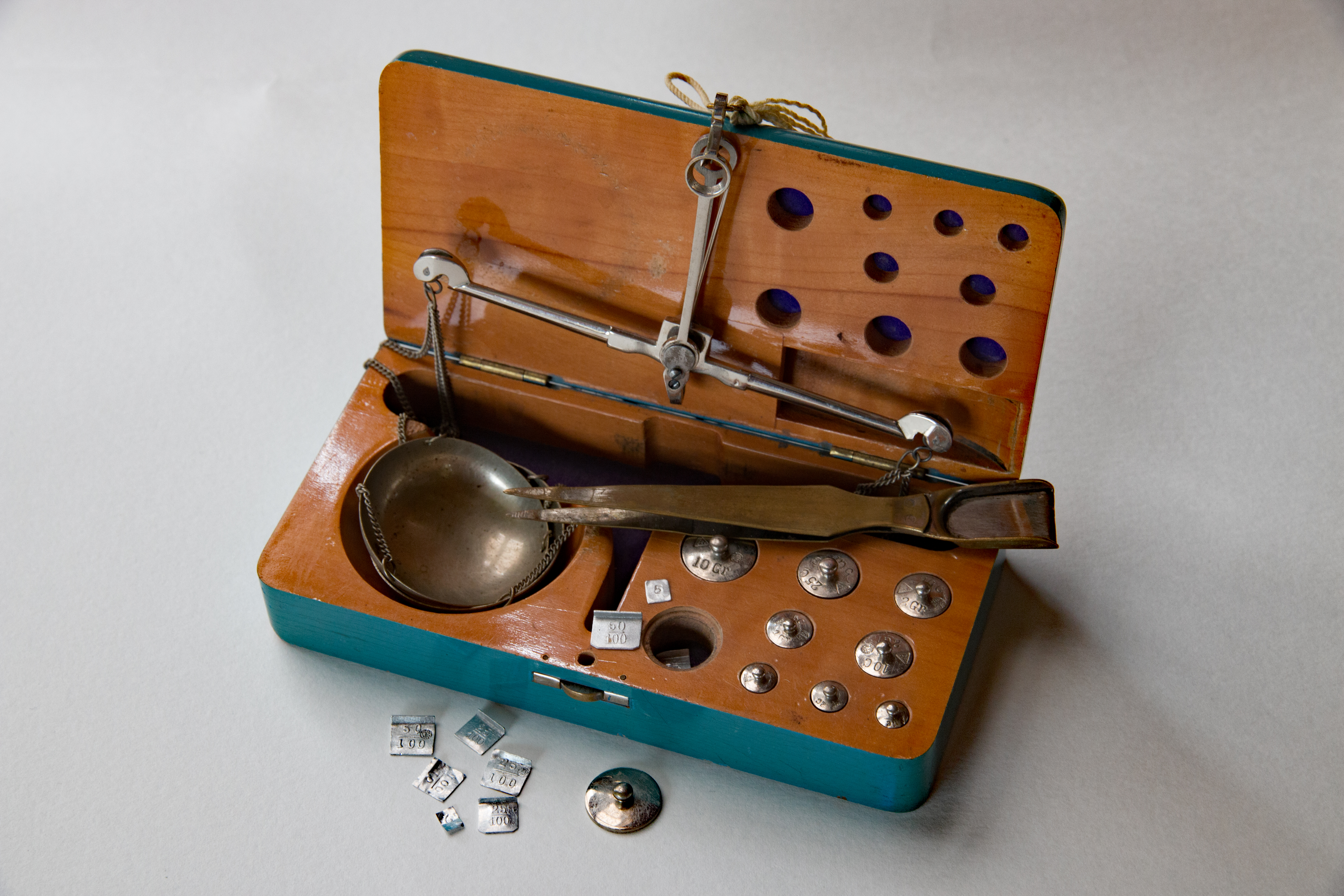 Diamant weegschaal met gewichten van 0.01 tot 25 karaat